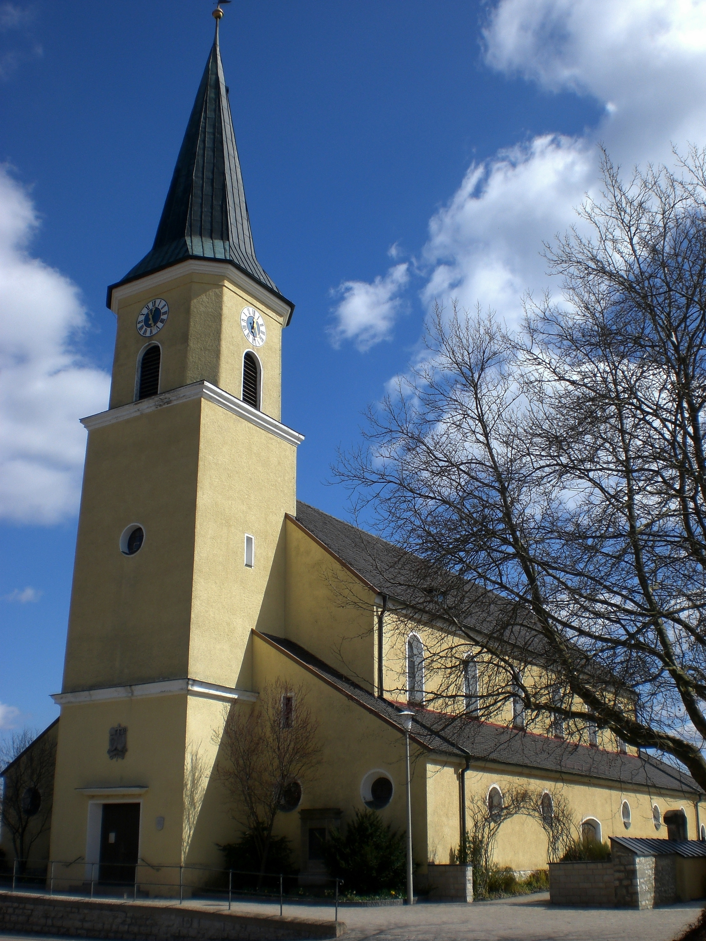 Pölling bei Neumarkt, Kath. Pfarrkirche, St. Martin